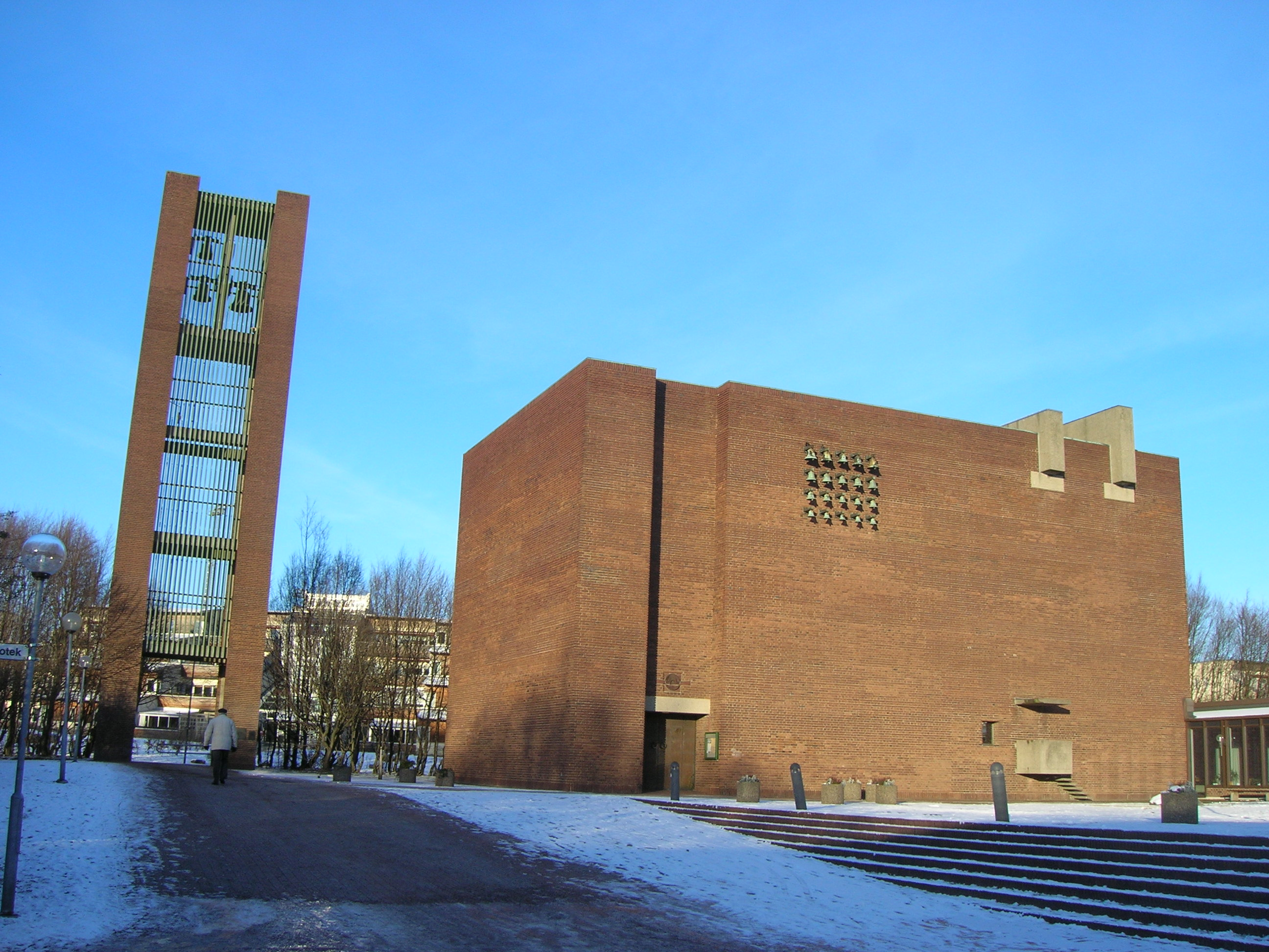 Helgeandskyrkan in Lund, Sweden.